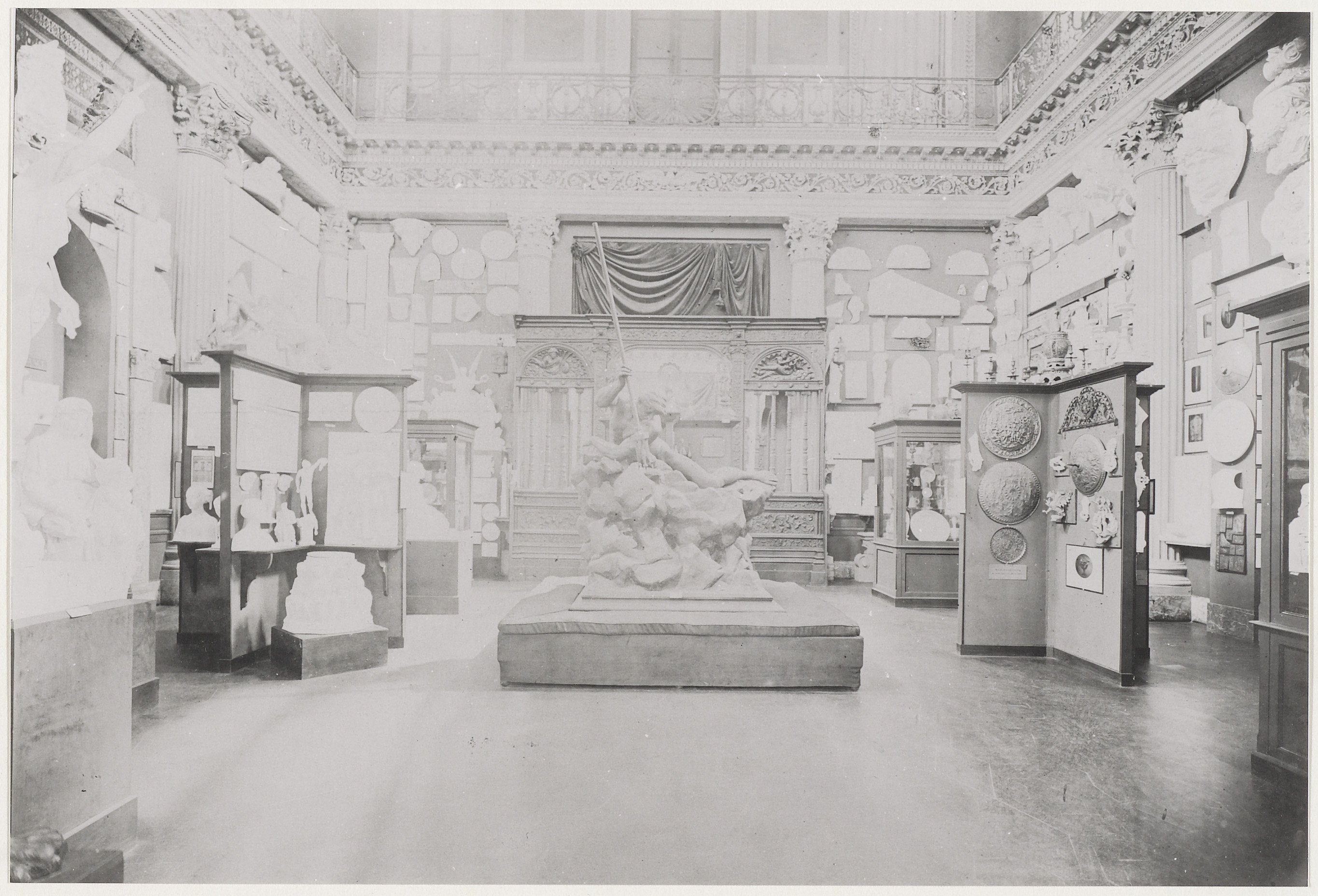 Interieur Paviljoen 'Welgelegen. Museum van Kunstnijverheid. De grote middenzaal met gipsafgietsels. Daarnaast was er een afdeling Antieken in gips in de westelijke zaal.